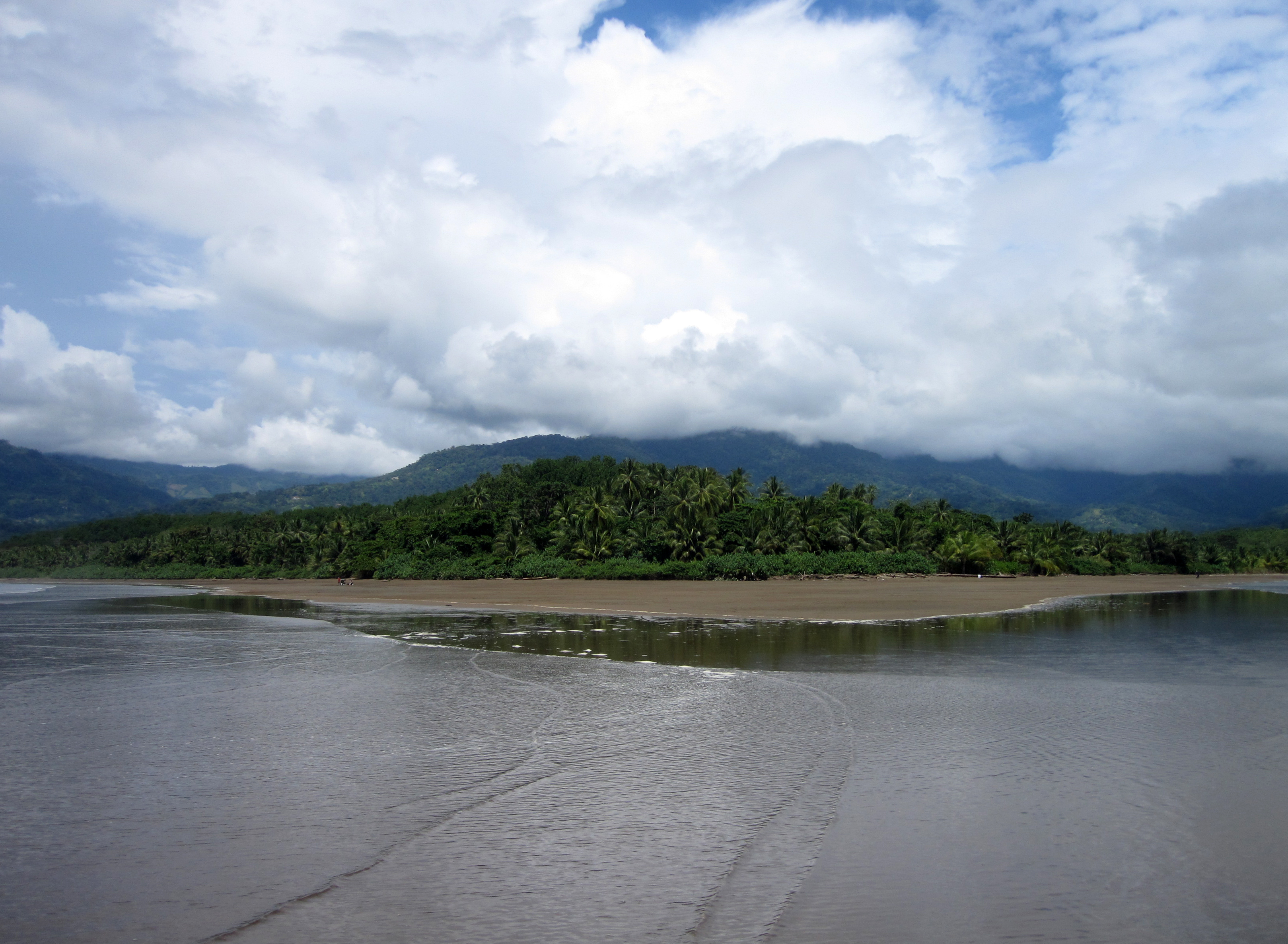 Playa Uvita i Marino Ballena nasjonalpark i Costa Rica